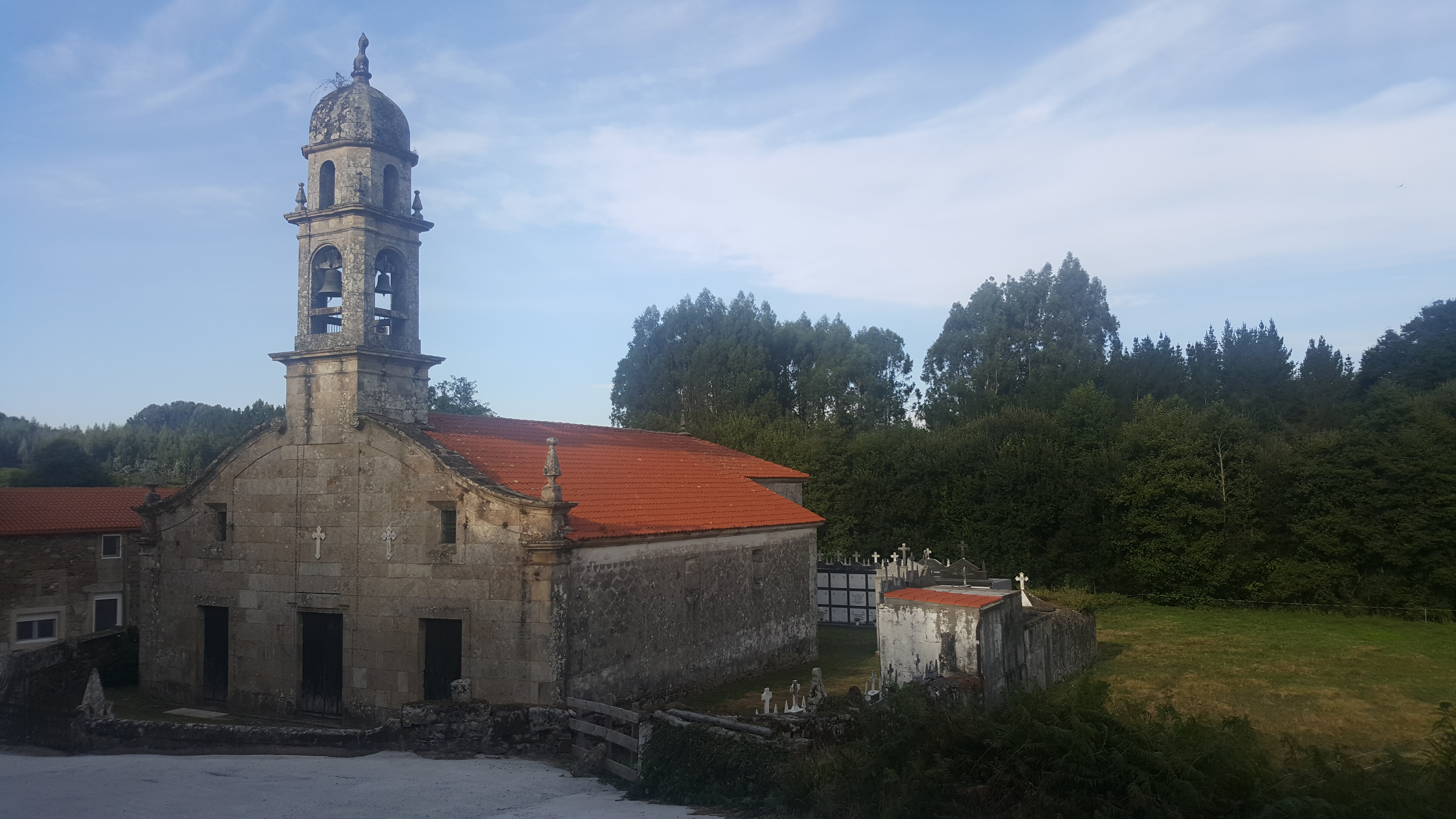 Igrexa Parroquial de San Breixo (Palas de Rei)